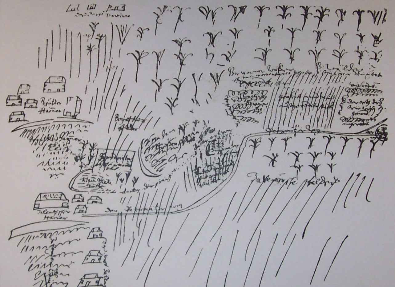 Mapa dzisiejszego terenu Katowic z 1686 roku. Na górze Brynów, niżej kuźnica bogucka, na dole kuźnicę załęską, wieś Załęże i drogę do Piotrowc